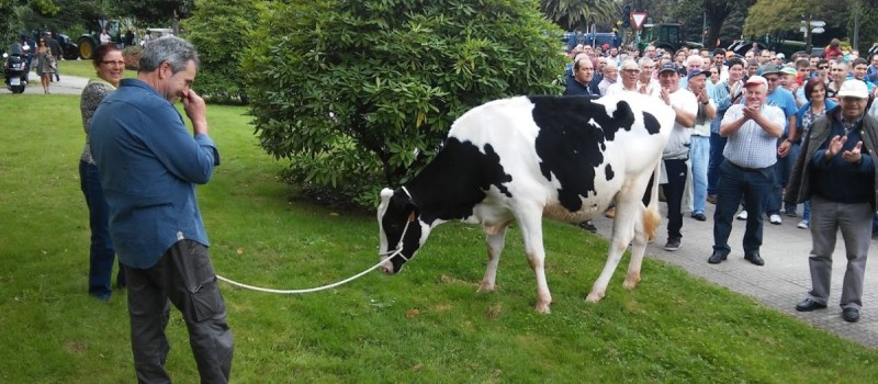 Unha vaca, nos xardíns da Xunta tras a manifestación dos gandeiros en Santiago.